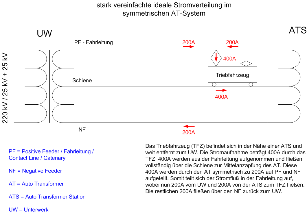 Stromaufteilung in einem Autotrafosystem